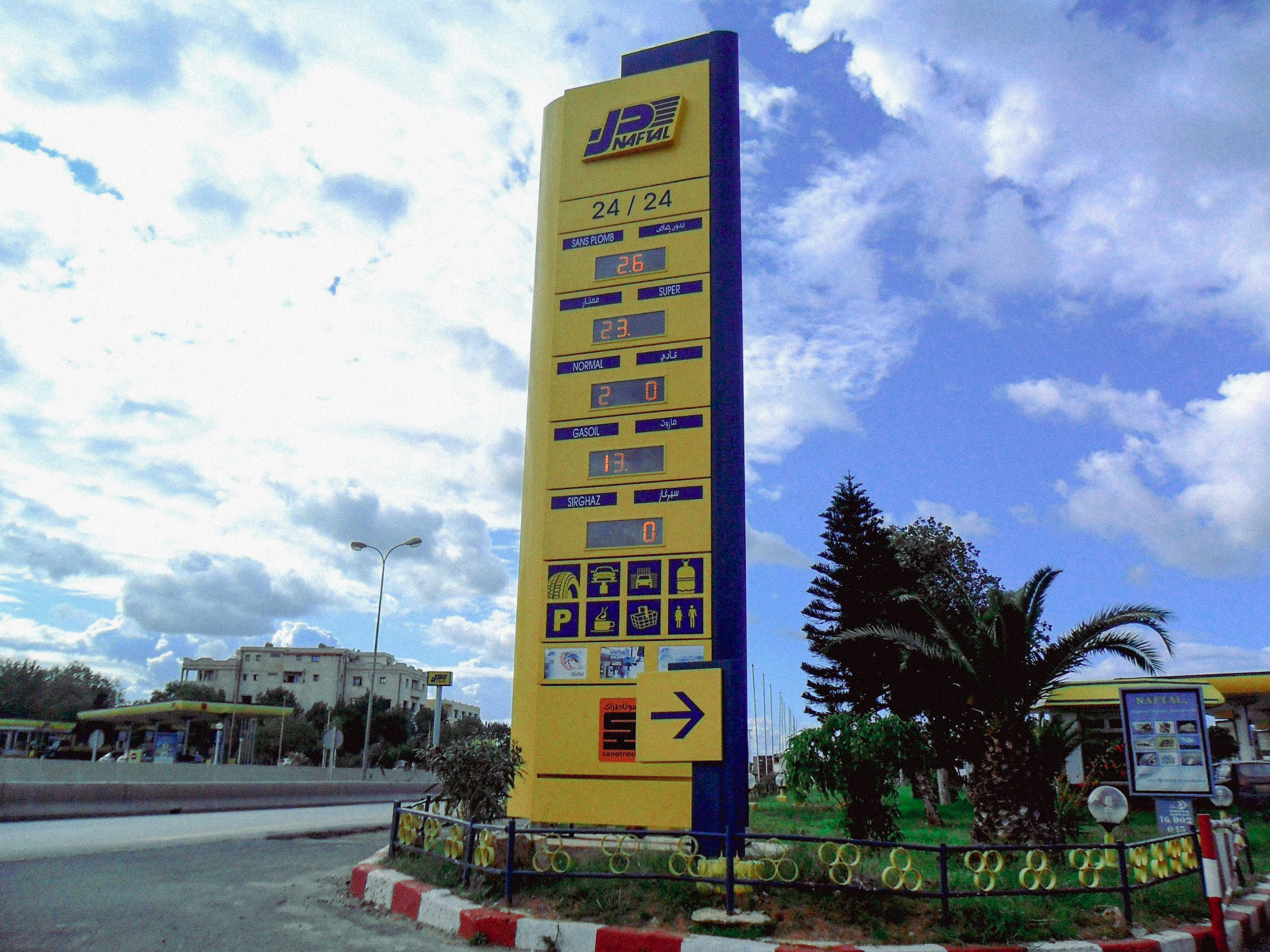 Naftal Zeralda